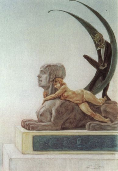 Frontispice des Diaboliques de Jules Barbey d'Aurevilly (1808-1889)